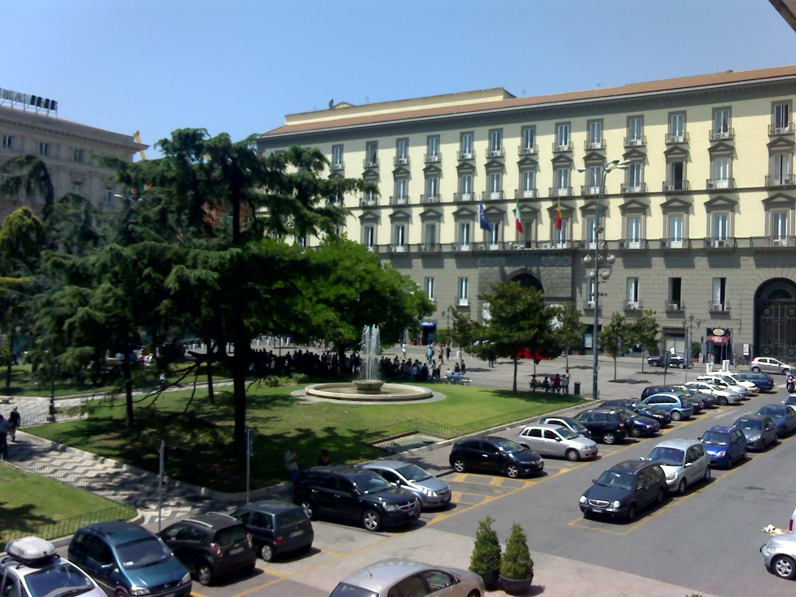 Piazza Municipio, Napoli. Lato verso il Palazzo San Giacomo, sede del comune di Napoli.